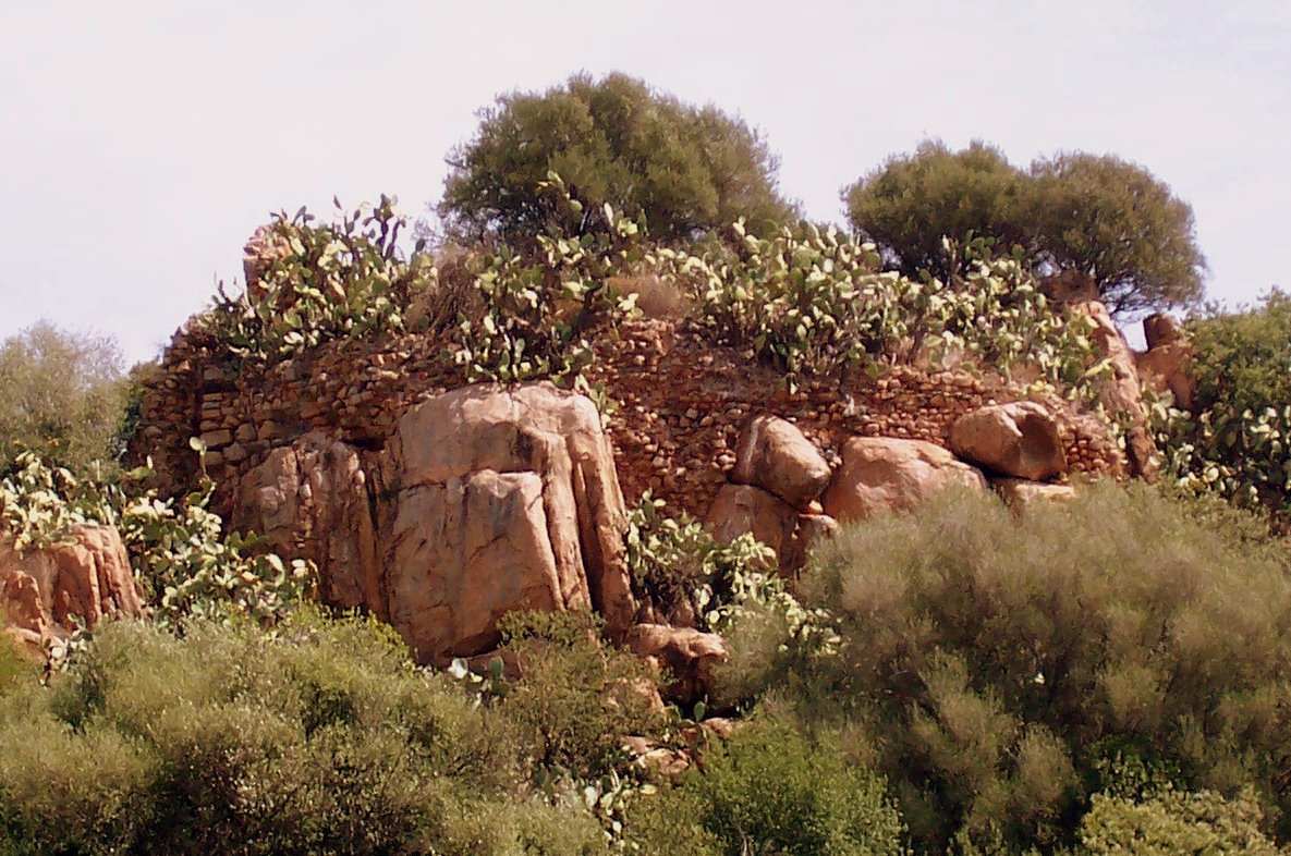 Vista d'insieme dei ruderi del Castello di Medusa, Lotzorai (Og)